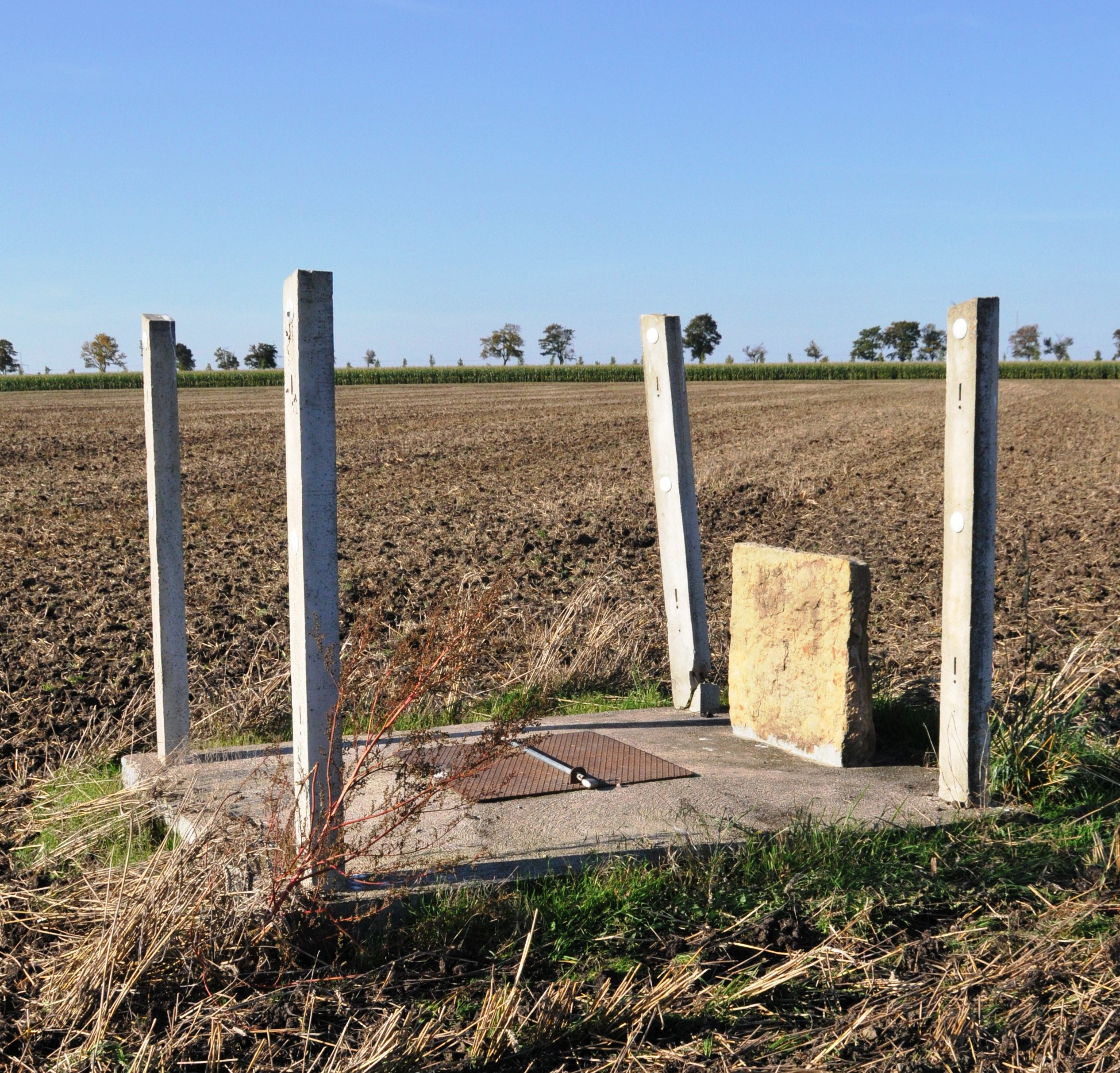 Grabsleben, Maternquelle